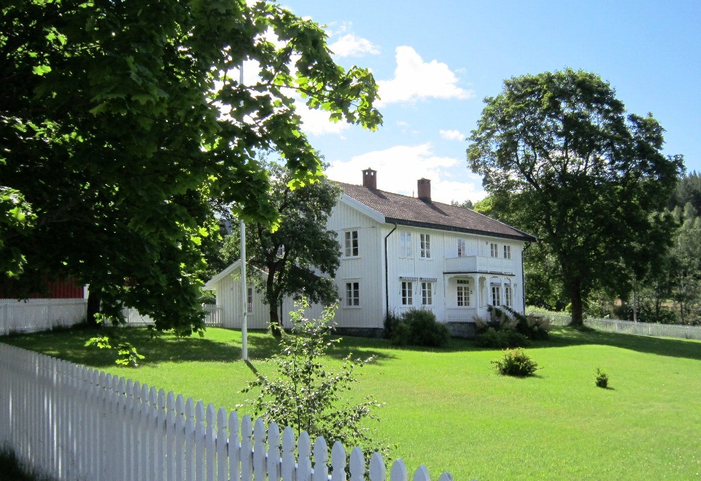 Nissedal prestegård